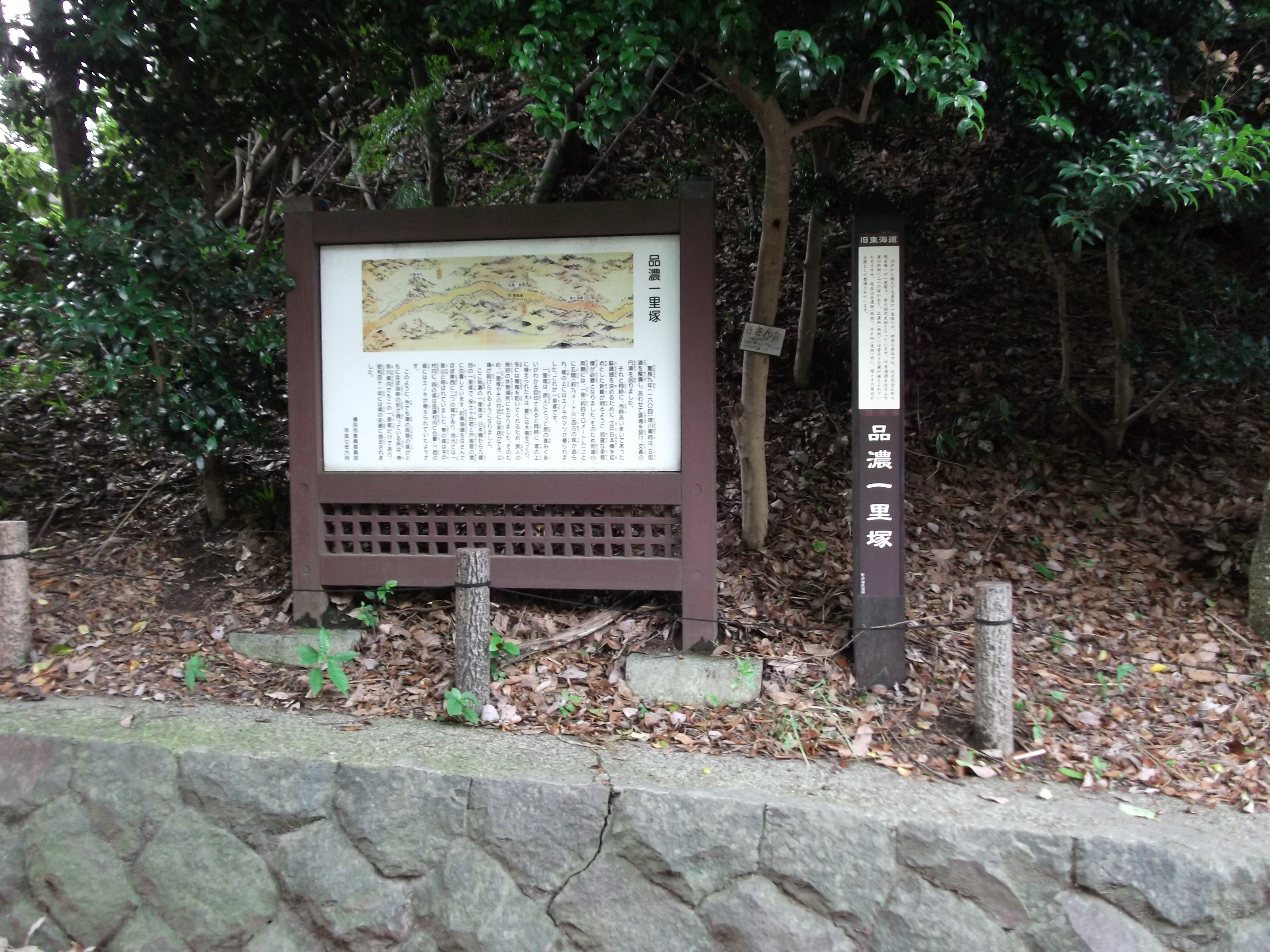 横浜市戸塚区品濃町 旧東海道 品濃一里塚